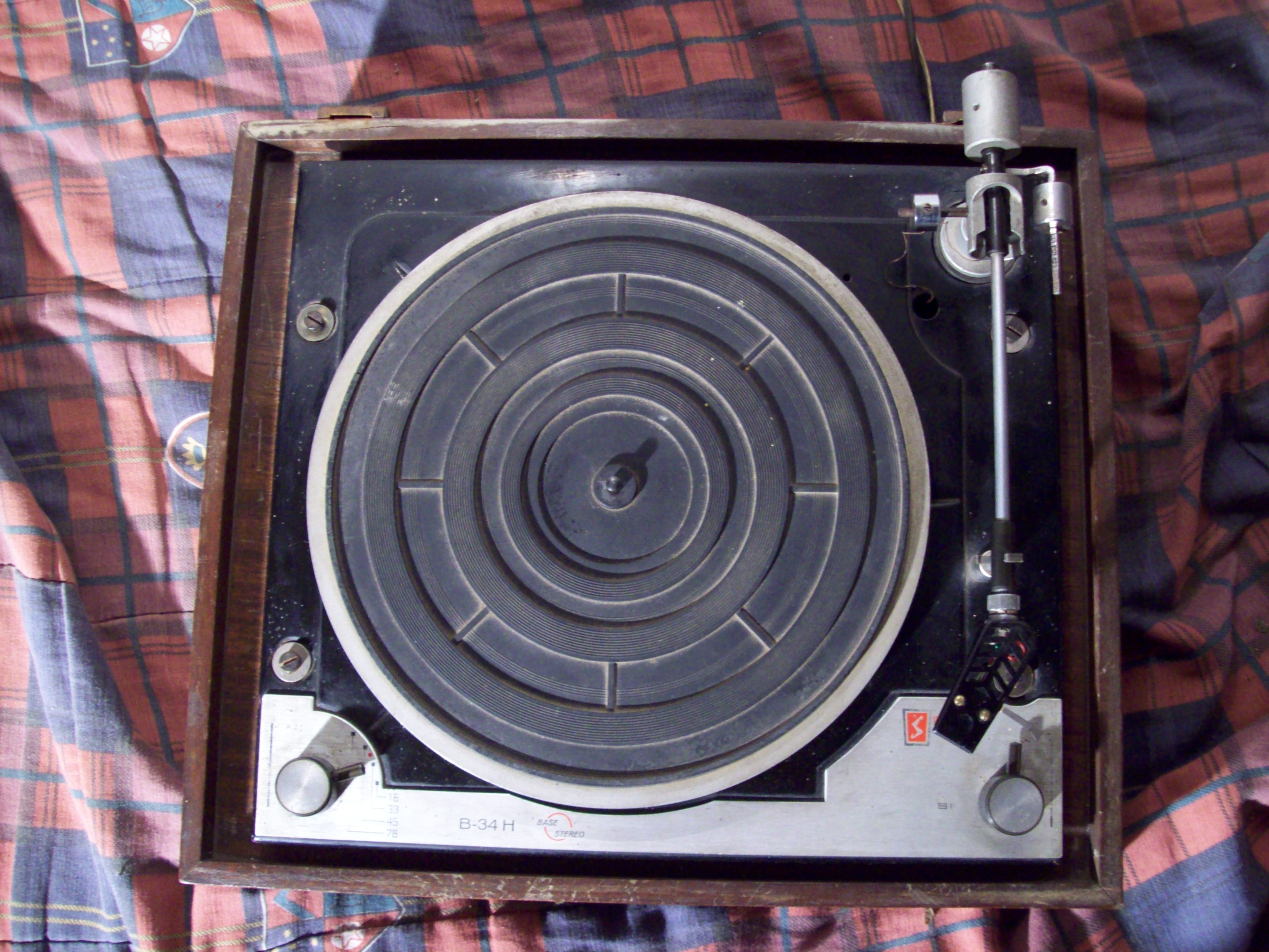 Es un tocadiscos manual Sincron, Argentina.